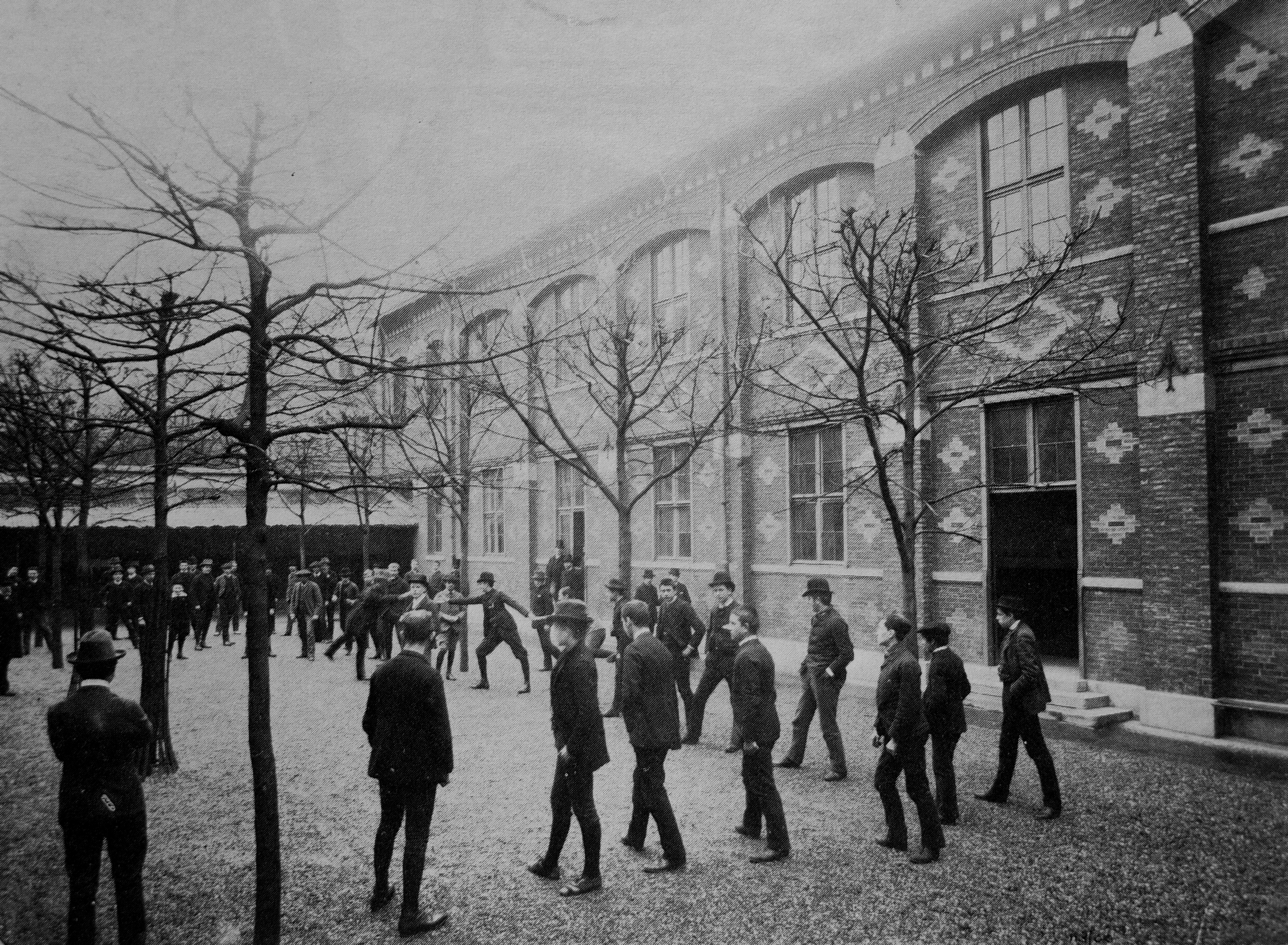 École Alsacienne, vers 1890, les élèves de la cour des grands jouent aux barres. Archives de l'école. Photographe non déterminé.